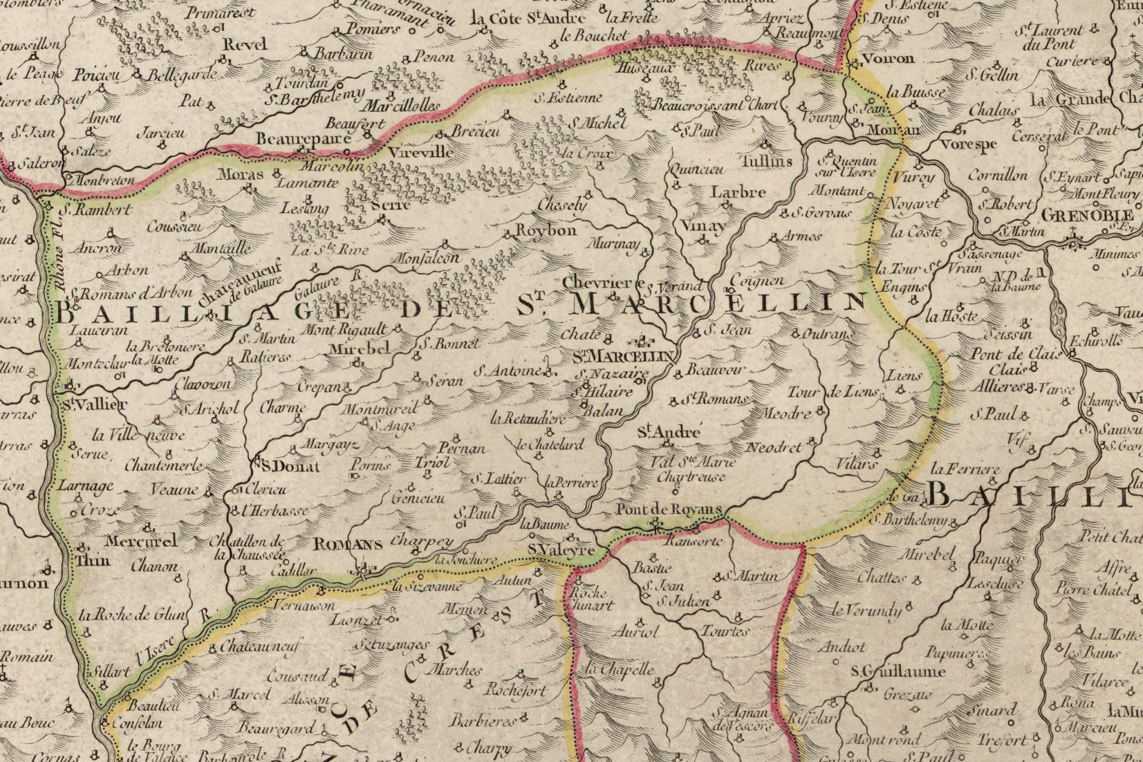 Carte du Baillage de Saint-Marcellin. Gouvernement général du Dauphiné divisé par bailliages.